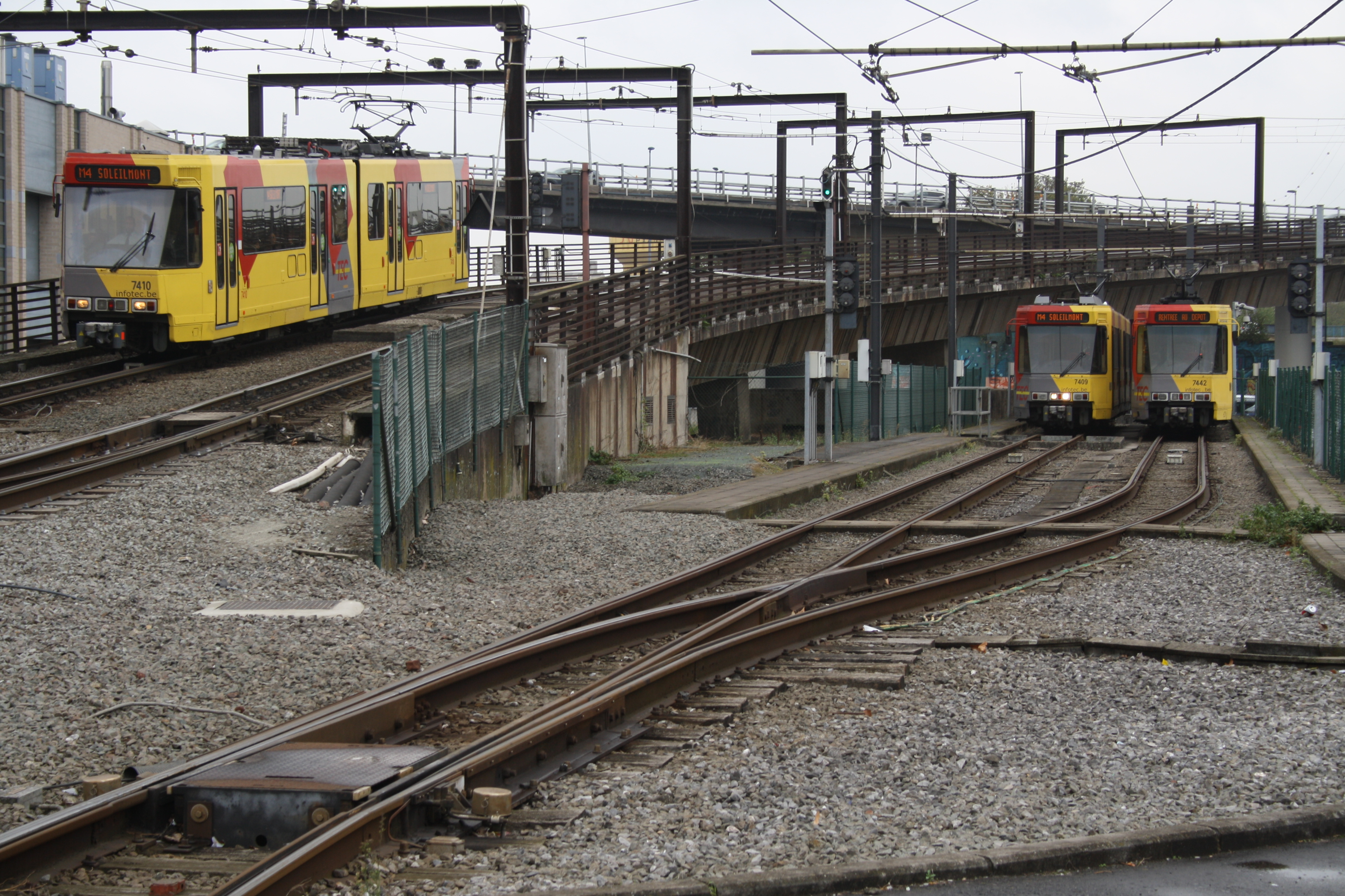 Strecken- und Abstellgleise Charleroi Sud